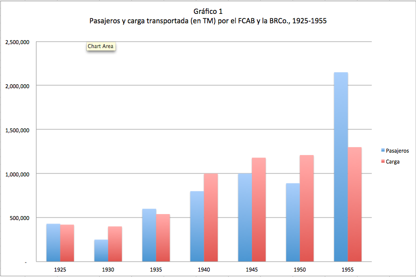 Gráfico construido sobre cifras estimadas de gráficos de República de Bolivia, Ministerio de Obras Públicas y Comunicaciones, Informe de la Comisión Nacional de Estudios de los Ferrocarriles de Antofagasta a Bolivia y The Bolivia Railway Company," La Paz, 1961.